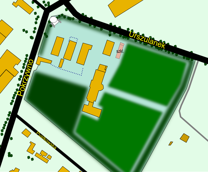 Reichsuniversitat Posen - Zakład Pokrzywno, mapa obecna